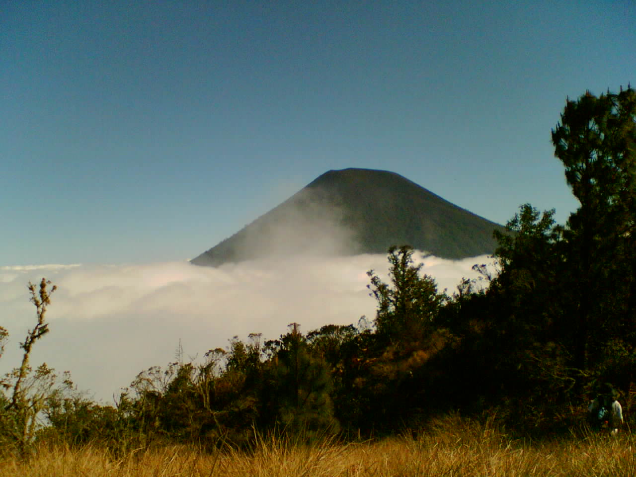 Vista del Volcán de Atitlán desde el Volcán Tolimán